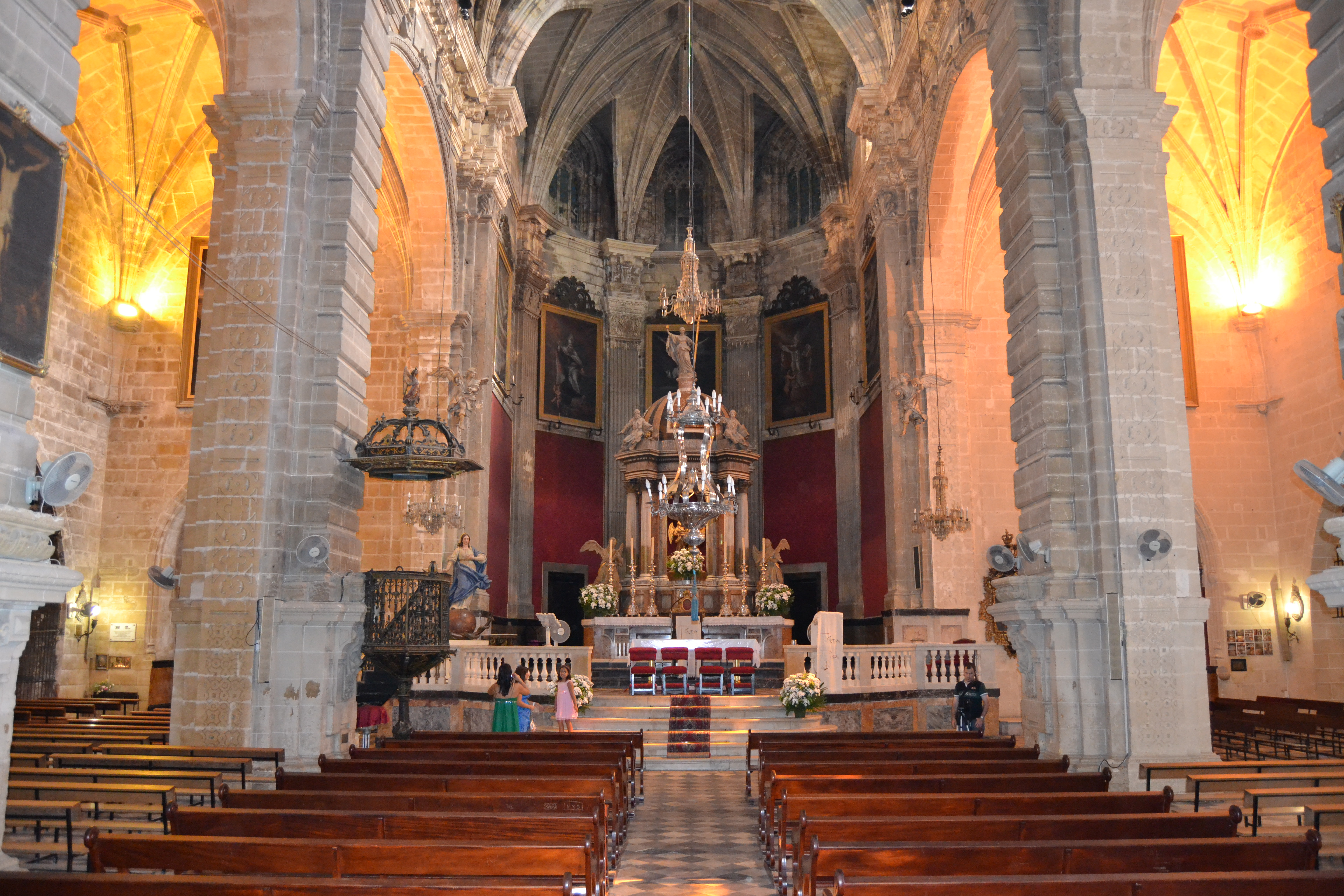 Iglesia Mayor Prioral, El Puerto de Santa María, España.